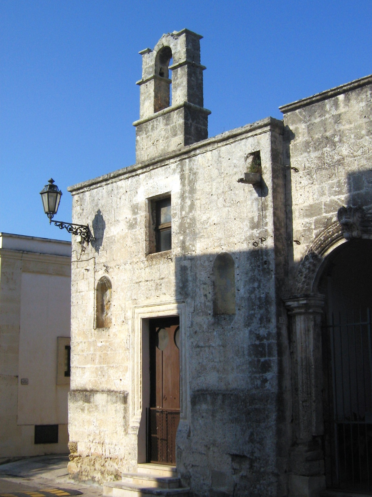 Calimera Chiesa Madonna di Costantinopoli